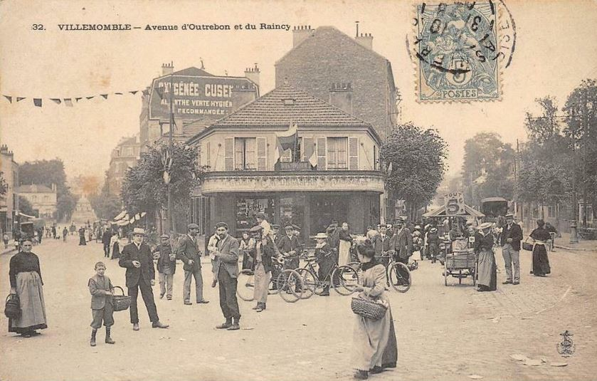 Villemomble.Avenue d'Outrebon.Avenue du Raincy